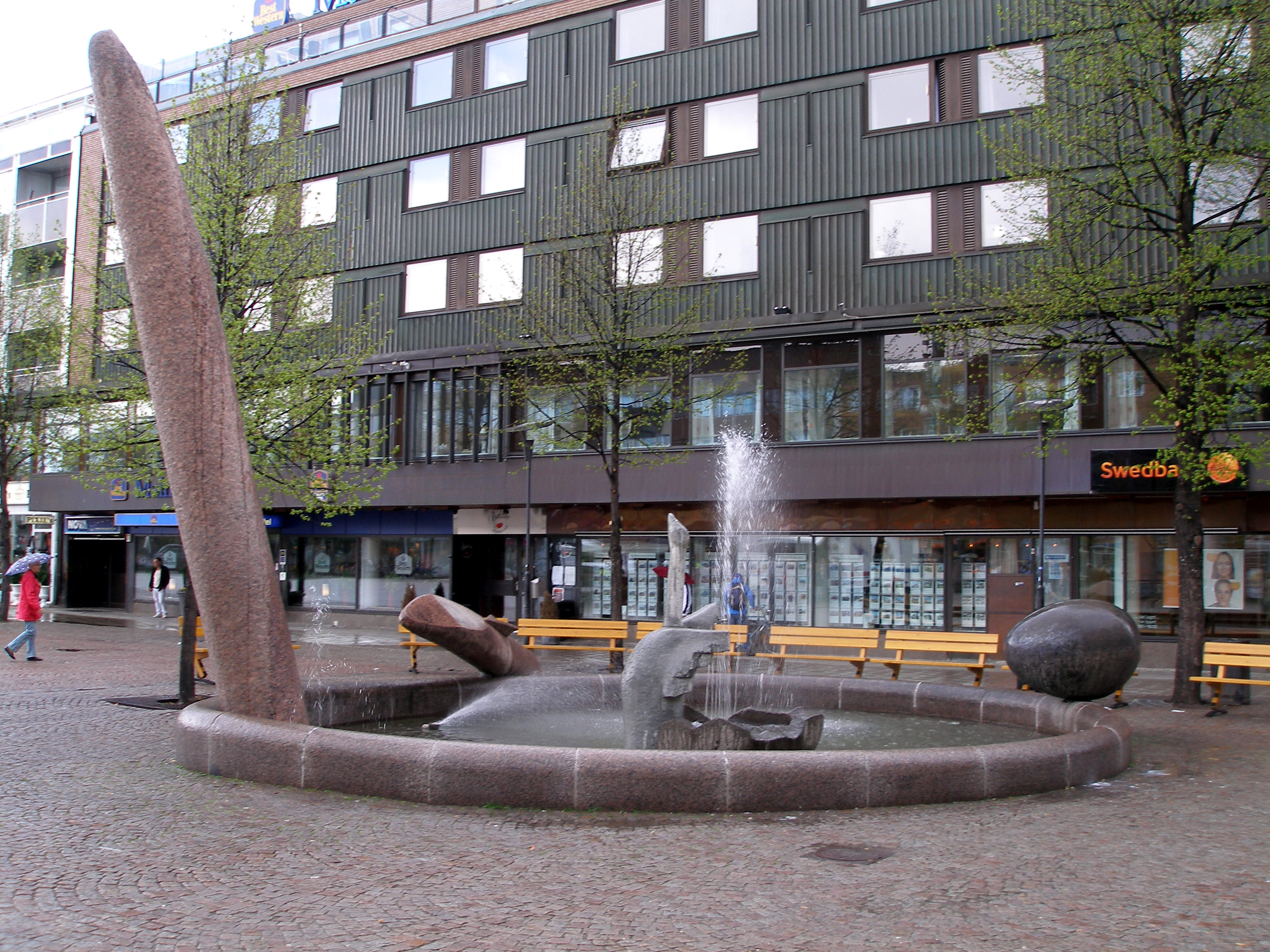 "Lyftet" av Bo Holmlund. Möjligheternas torg i Skellefteå.